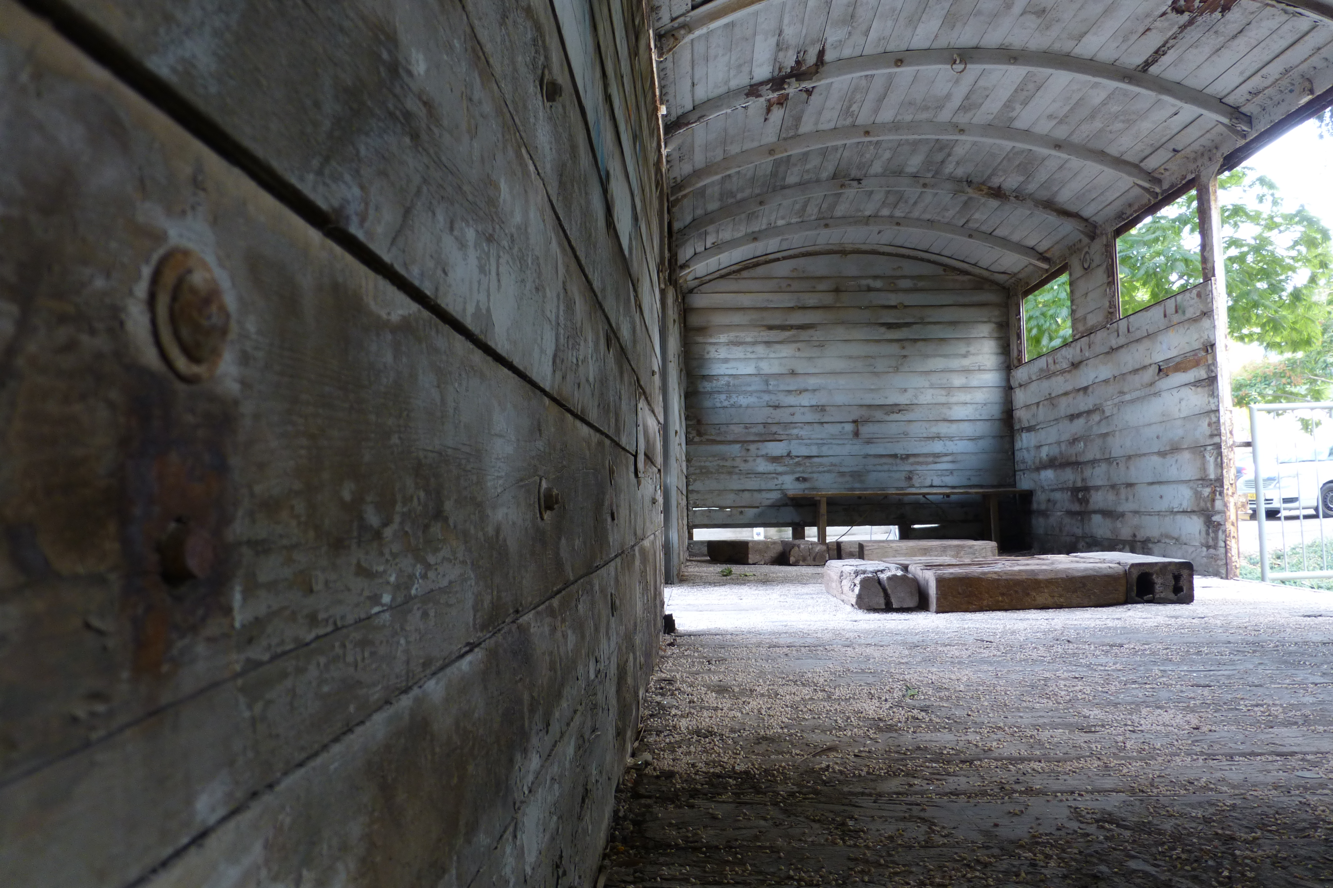 בית המסילאים תחנת רכבת יגור